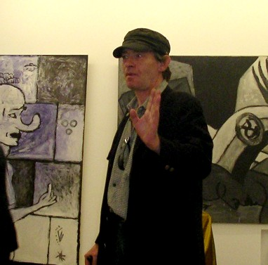 Der Maler und Grafiker Volker Mehner während einer Ausstellungseröffnung in Berlin-Mitte.